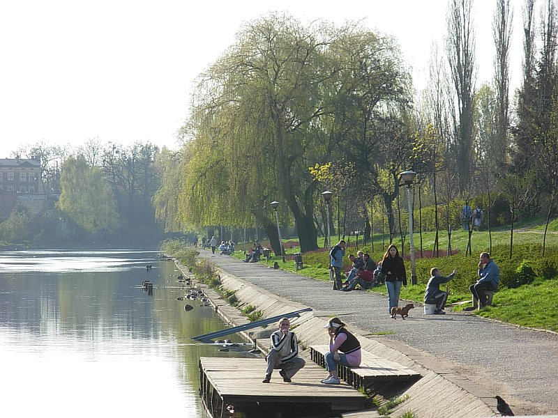 Brda w Bydgoszczy - bulwar Królowej Jadwigi